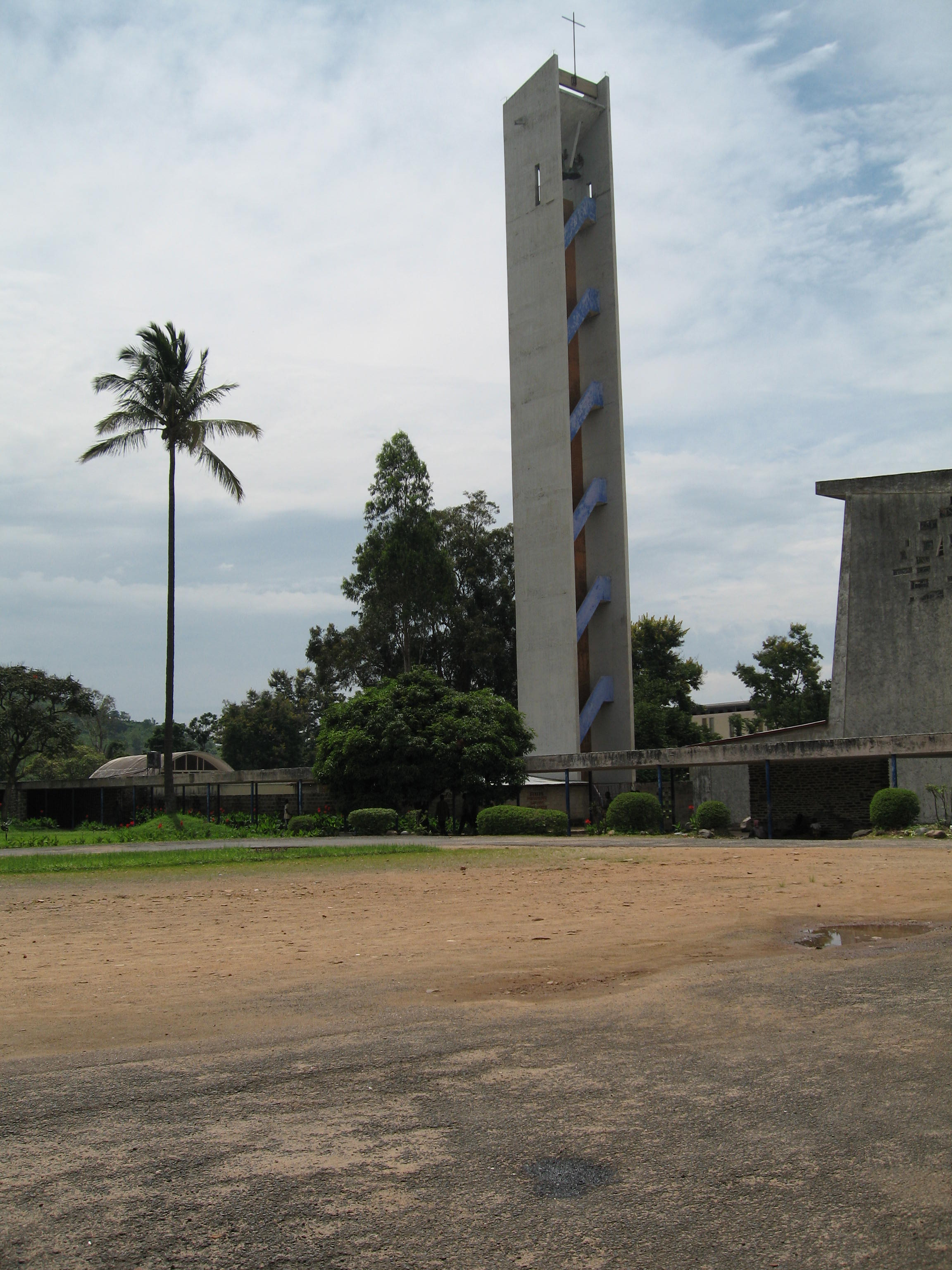 Universidad de Bujumbura, Campus de Kiriri. Burundi